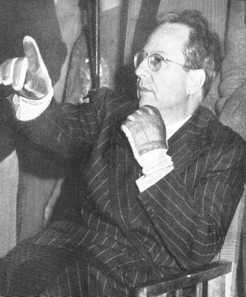 Il regista Riccardo Freda nel 1958